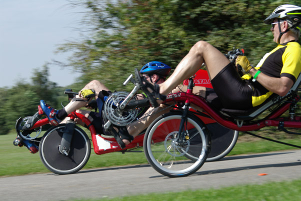 An HPV race (Salt Ayre circuit, Cyclefest 2004)